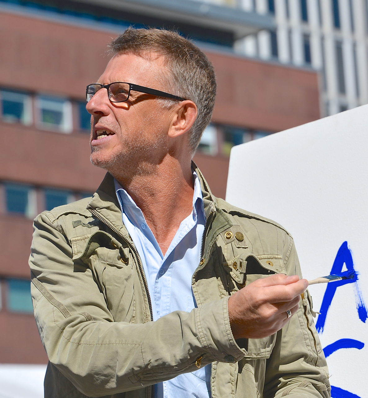 Steve Kratz på Sergels torg under Stockholms Kulturfestival 2013. Smakprover ges ur den kommande säsongens föreställningar på Stockholms Stadsteater.